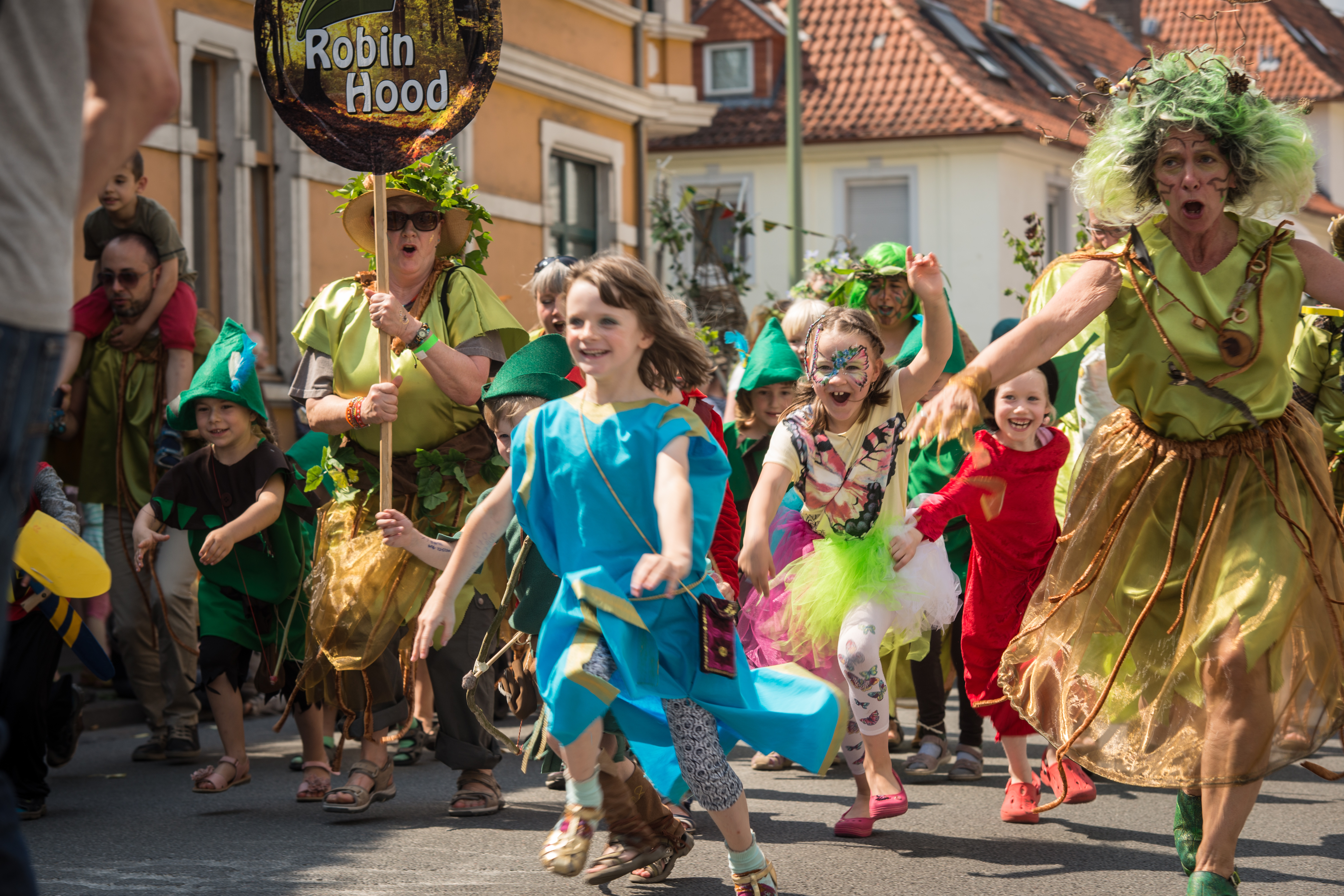 Photo by: Joachim Müller